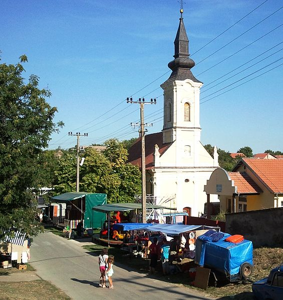 Сеоска слава у Шуљму, Србија.